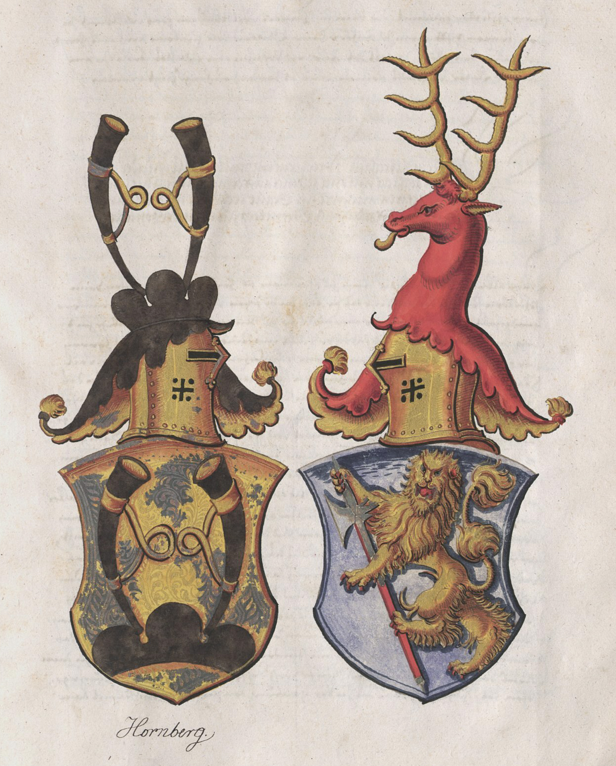 Wappen aus der Zimmerischen Chronik, Handschrift B, Württembergische Landesbibliothek Stuttgart, Cod. Don. 580a, S. 79, Allianzwappen Hornberg / Zimmern